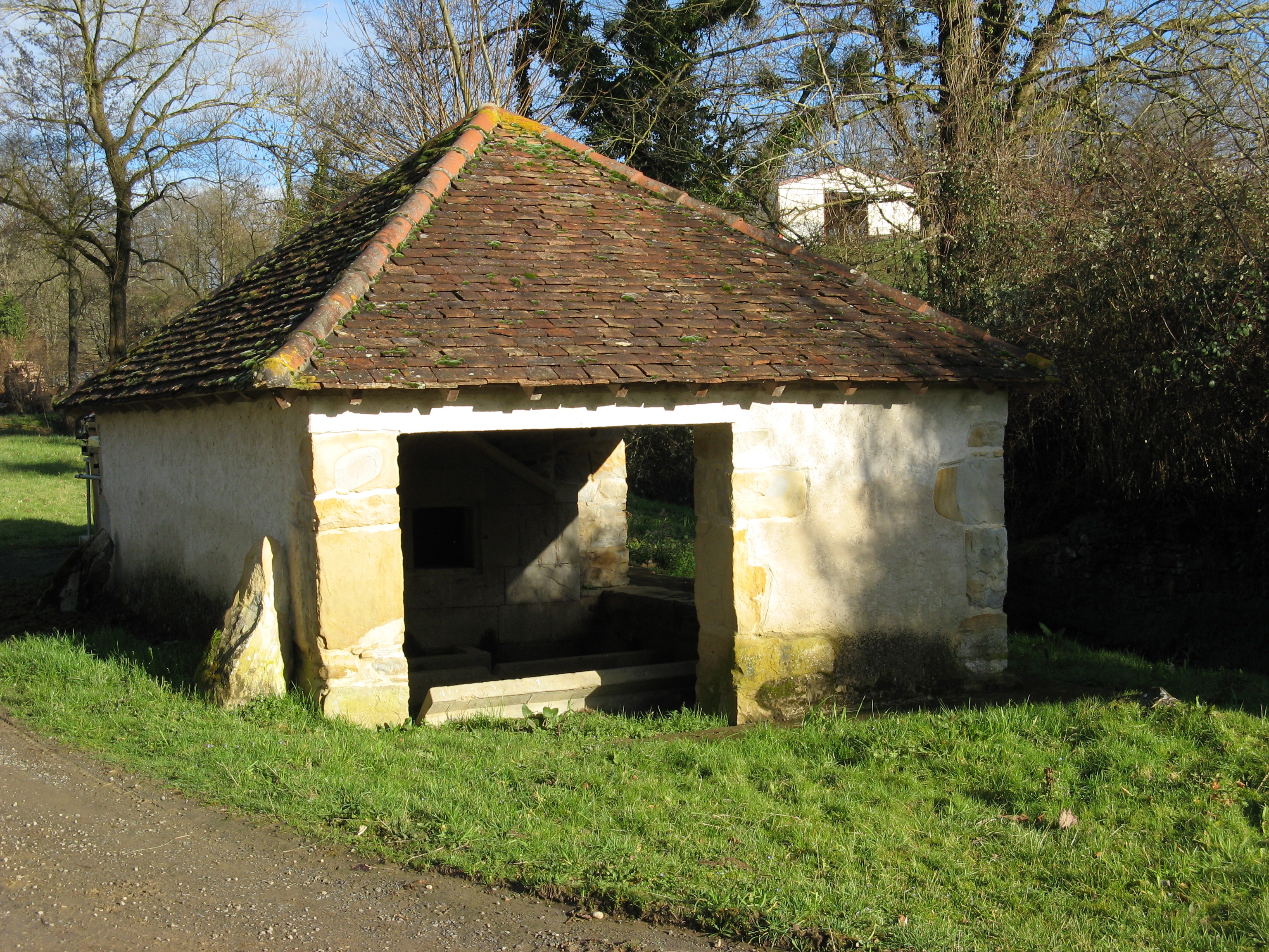 Lavoir, commune d'Ossenx - 64190